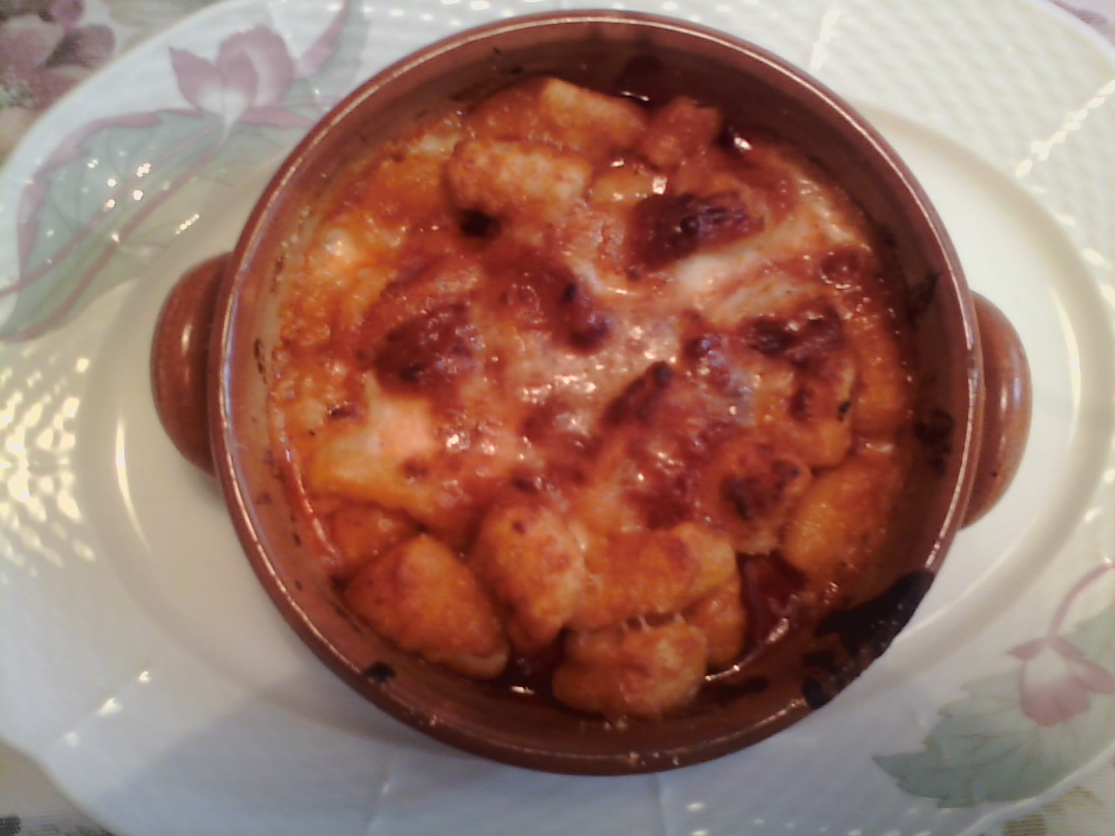 Gnocchi Gratinati alla Sorrentina